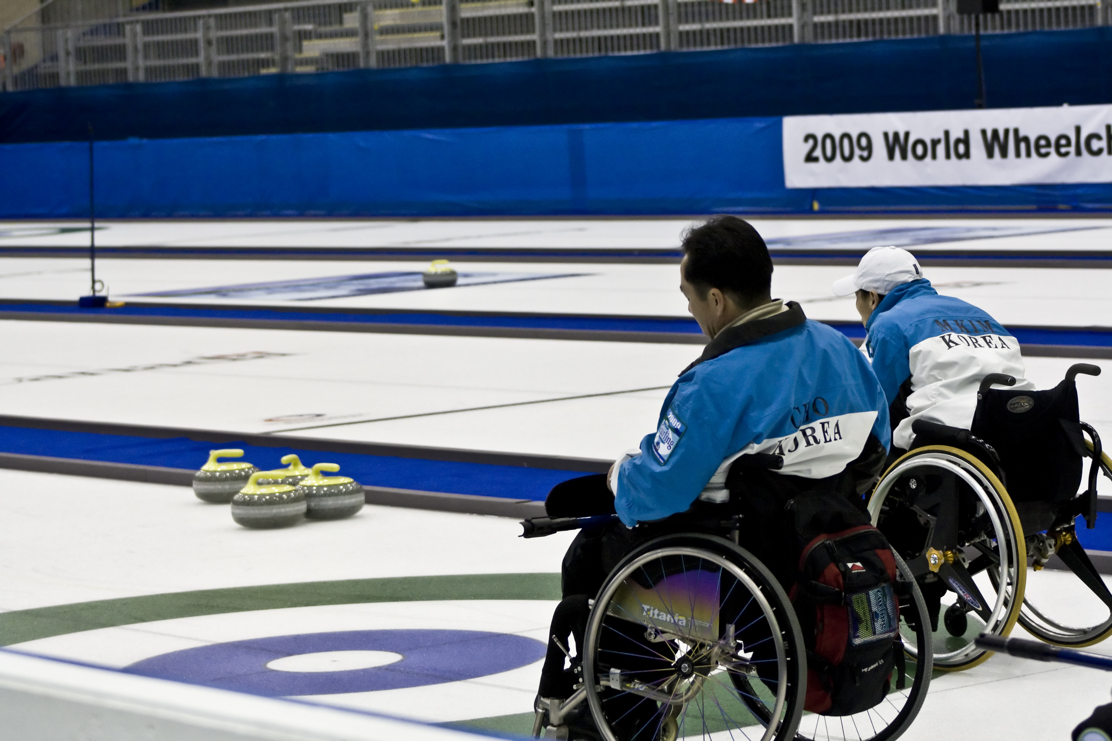 Team Korea - Kim Myungjin and Cho Yanghyun